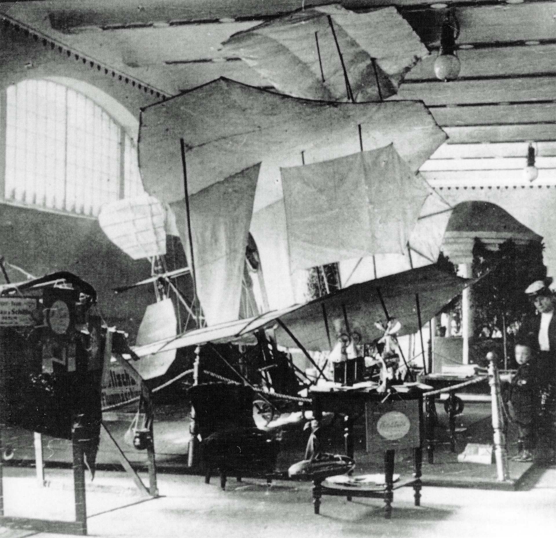 Der "Jatho-Drachen" im April/Mai 1907. Dieses Bild vom Jatho-Dreiflächer entstand zwischen dem 20. April und 5. Mai 1907 auf der Internationalen Sport-Ausstellung Berlin 1907.